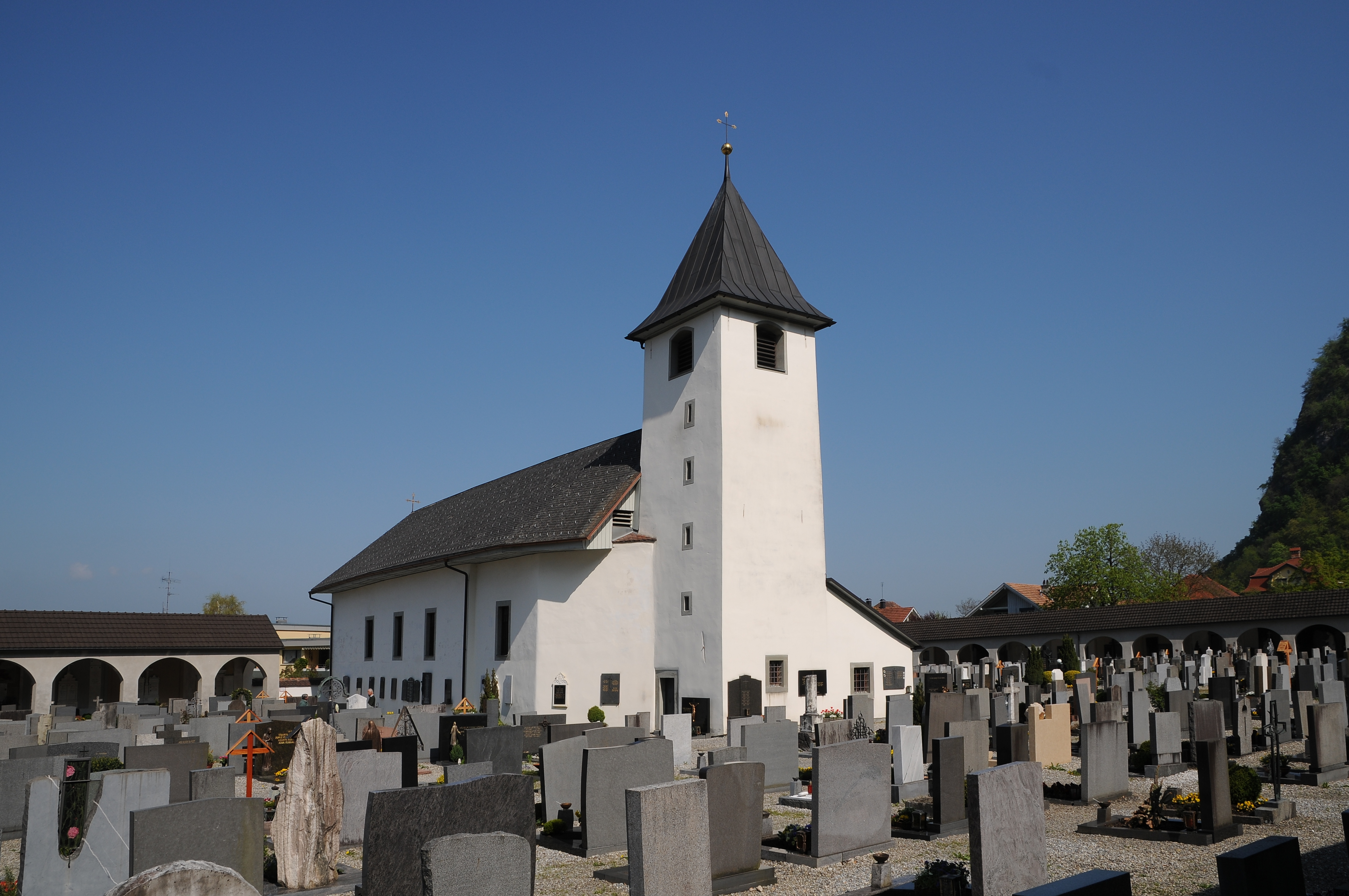 hll. Sebastian und Antonius an der St.Anton-Straße in Hohenems; Info Dieses Objekt steht unter Denkmalschutz.